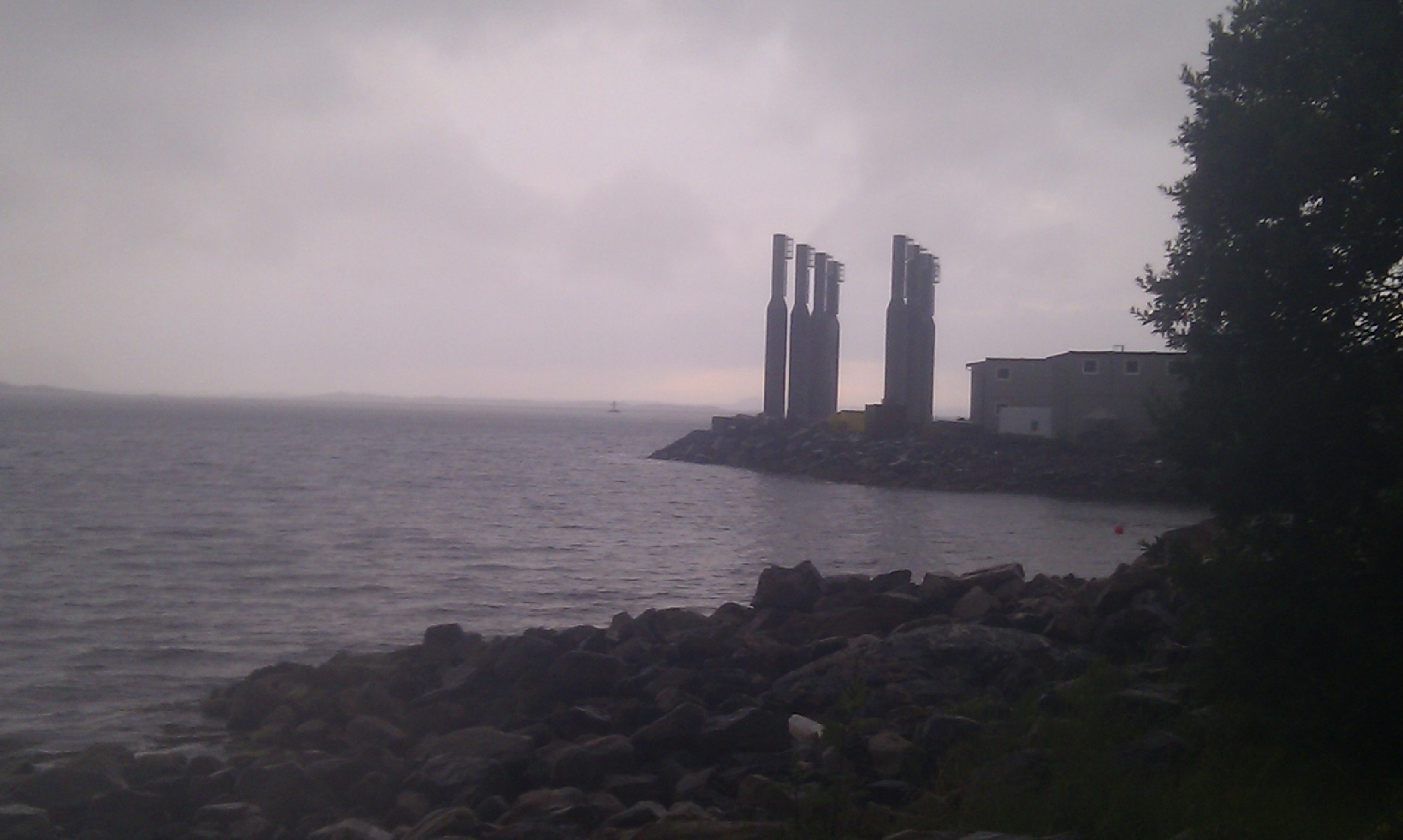 Nye farledslys for Lepsøyrenna over Lepsøyrevet lagra i Søvika 2012